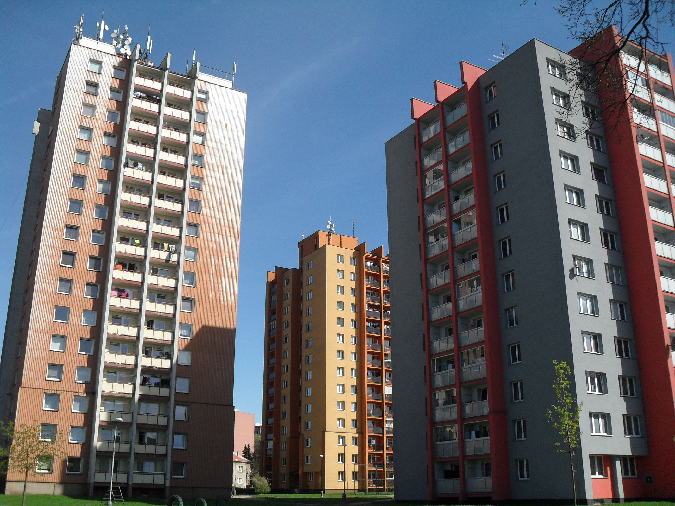 Centrum Karviné